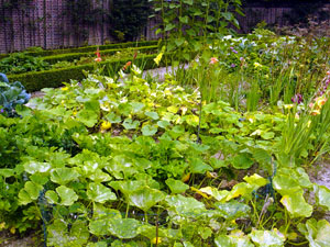 Potager communautaire